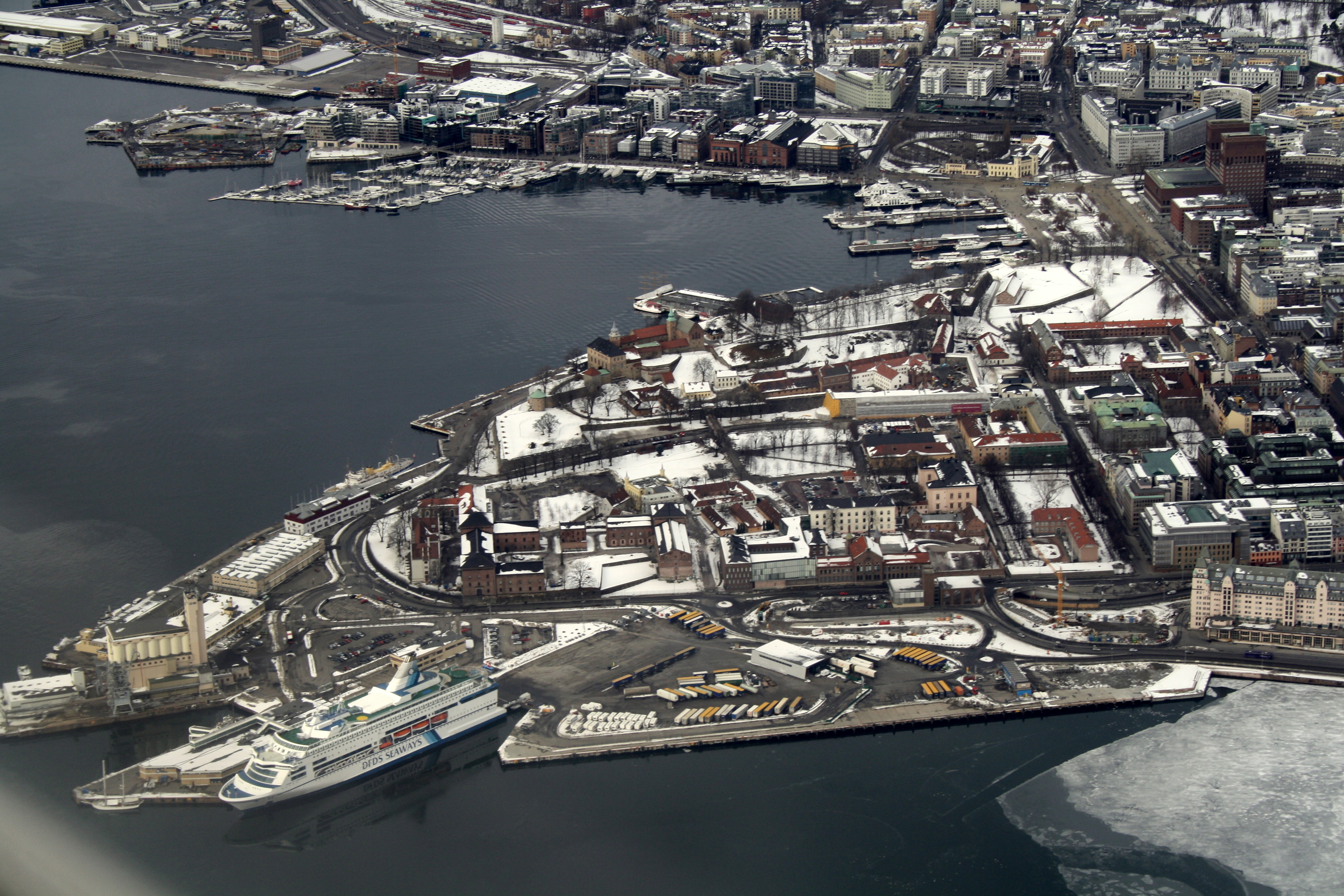 Oslo from air!